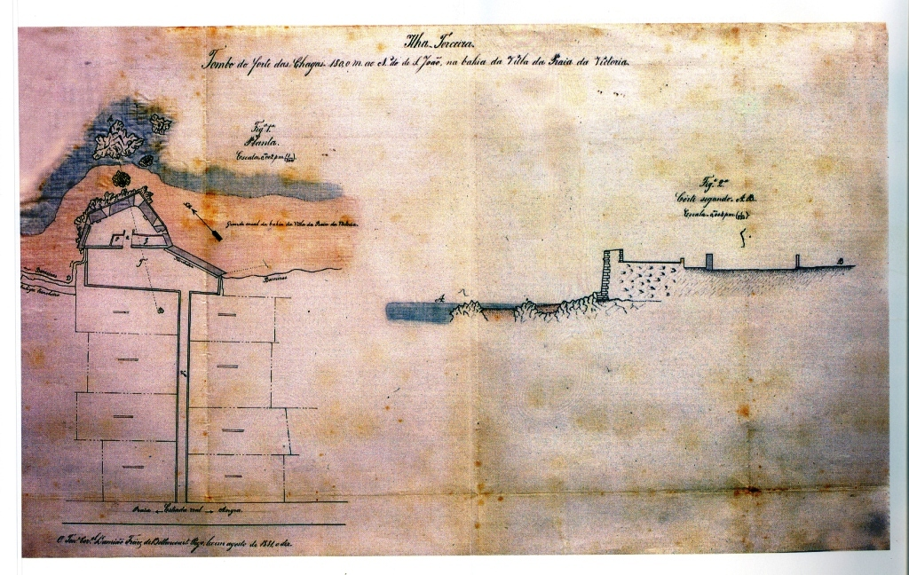 "Tombo do Forte das Chagas..." Ilha Terceira (Açores), Portugal.